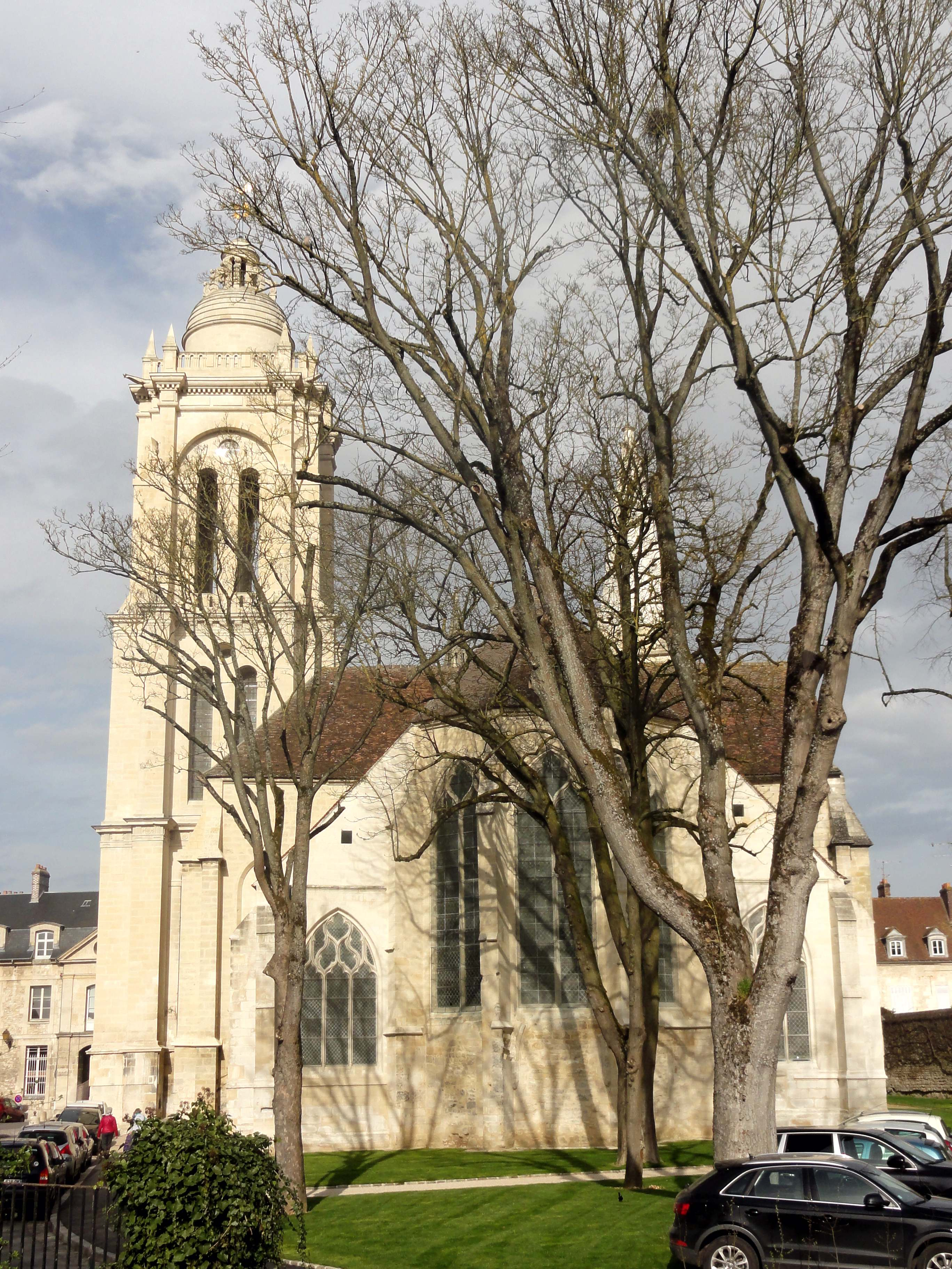 Église Saint-Pierre de Senlis - voir titre.